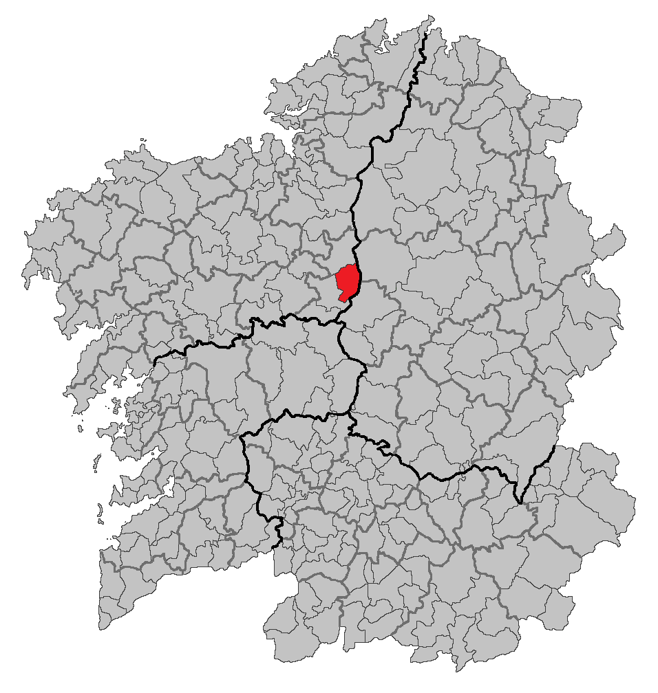 Mapa coa localización do concello de Toques.